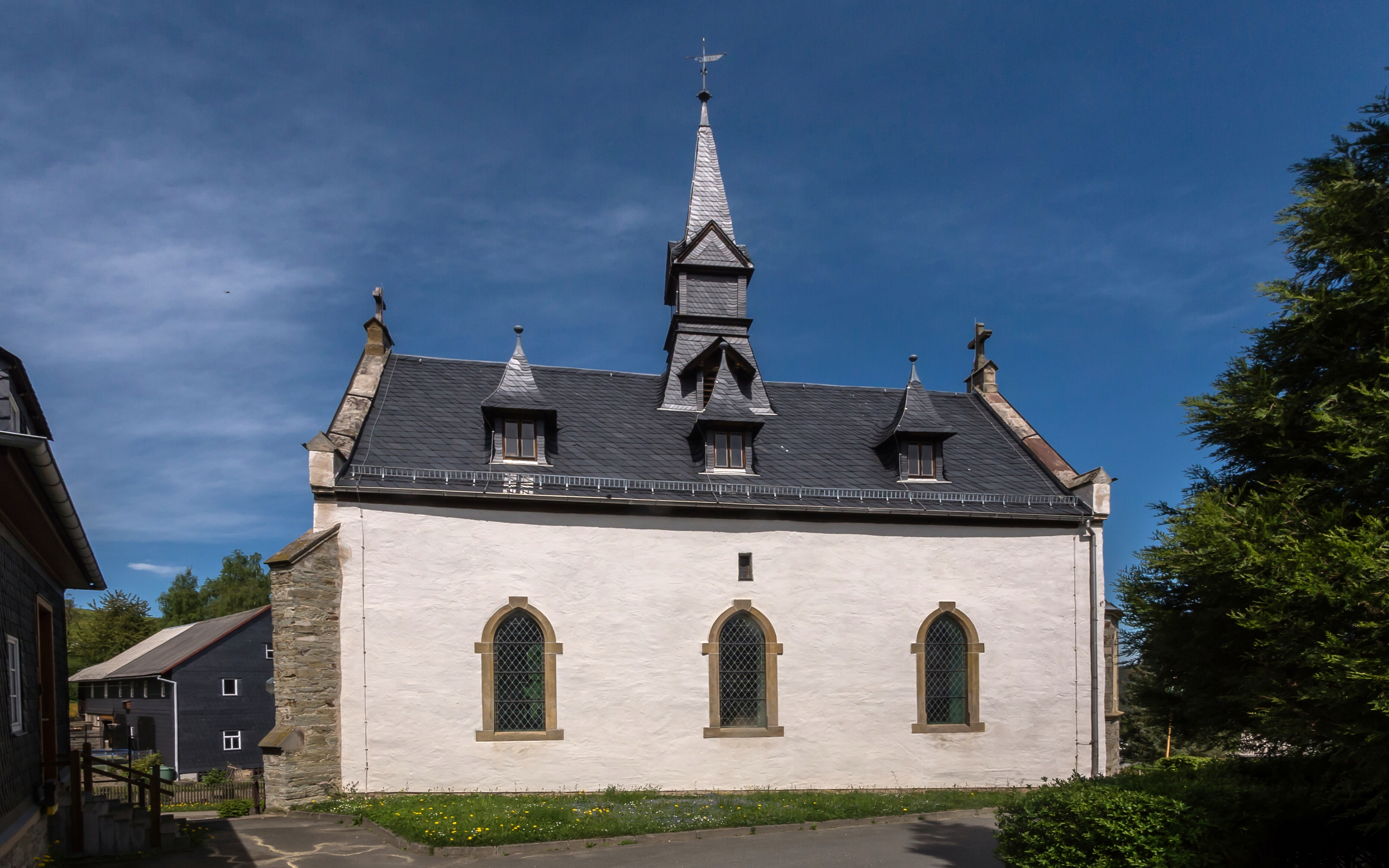 Volkmannsdorf Kirche